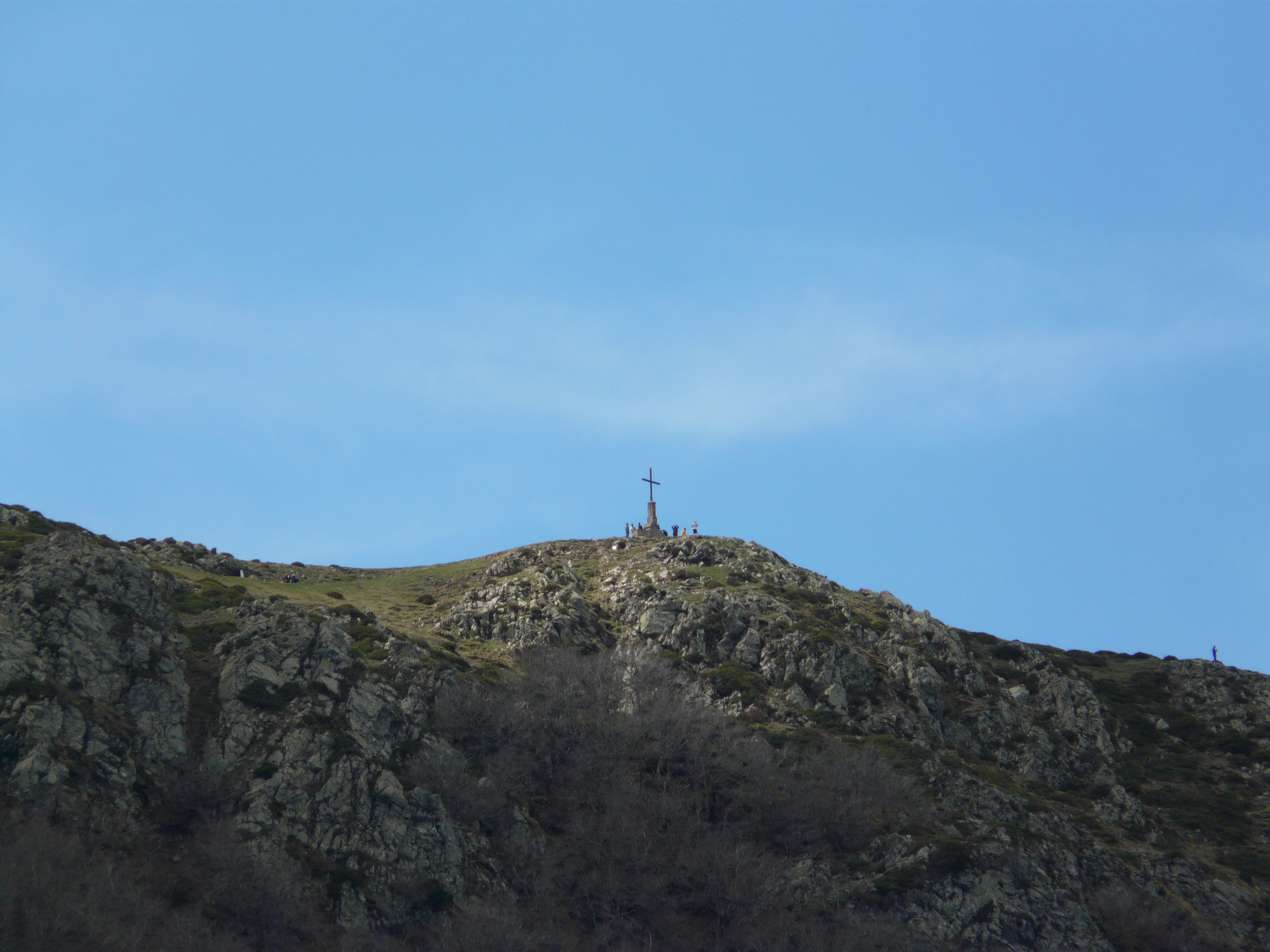 Matagalls (Osona) (Viladrau). Massís del Montseny. This is a a photo of an emblematic summit in Catalonia, Spain, with id: CE-294106006 Object location41° 48′ 31.66″ N, 2° 22′ 57.86″ E